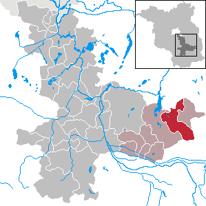 Lieberose in Brandenburg (Country) - District Dahme-Spreewald